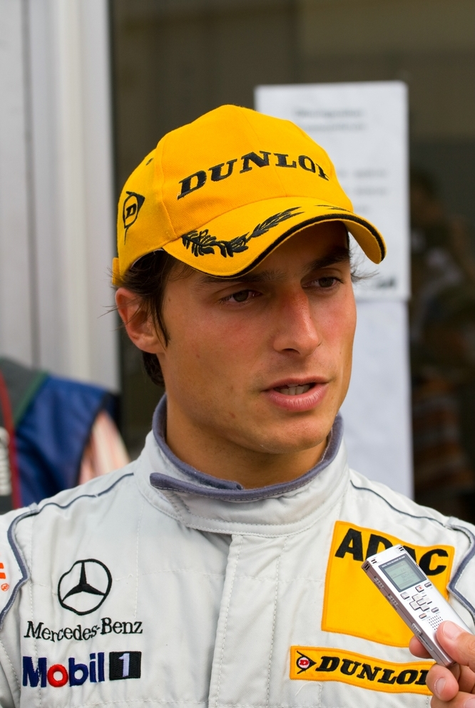 Photographie de Bruno Spengler en 2010 sur le Norisring, en DTM.